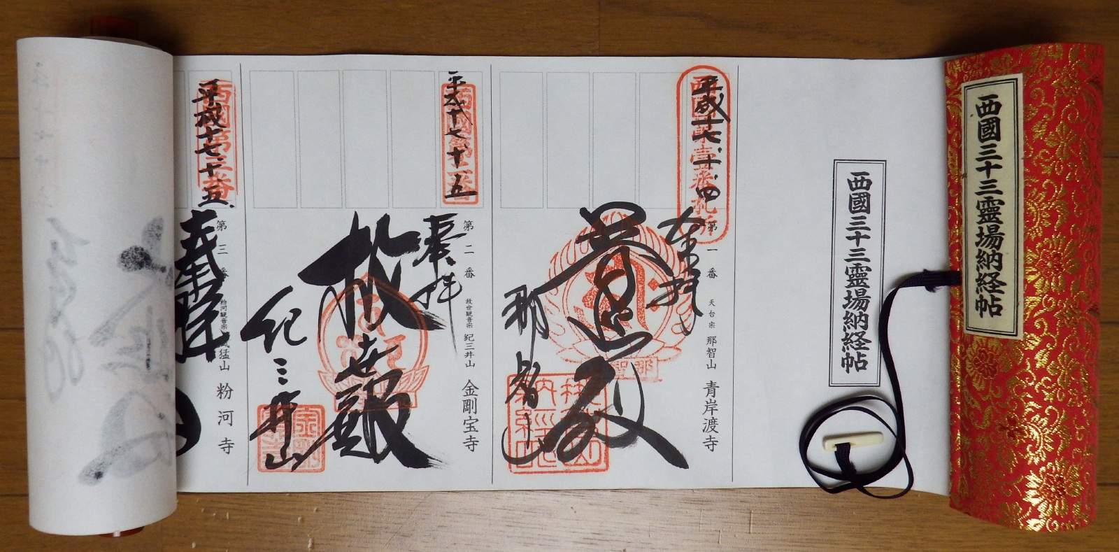 西国三十三所の先達用納経帳